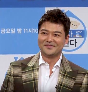 MBC '나 혼자 산다' 5주년 기자 간담회